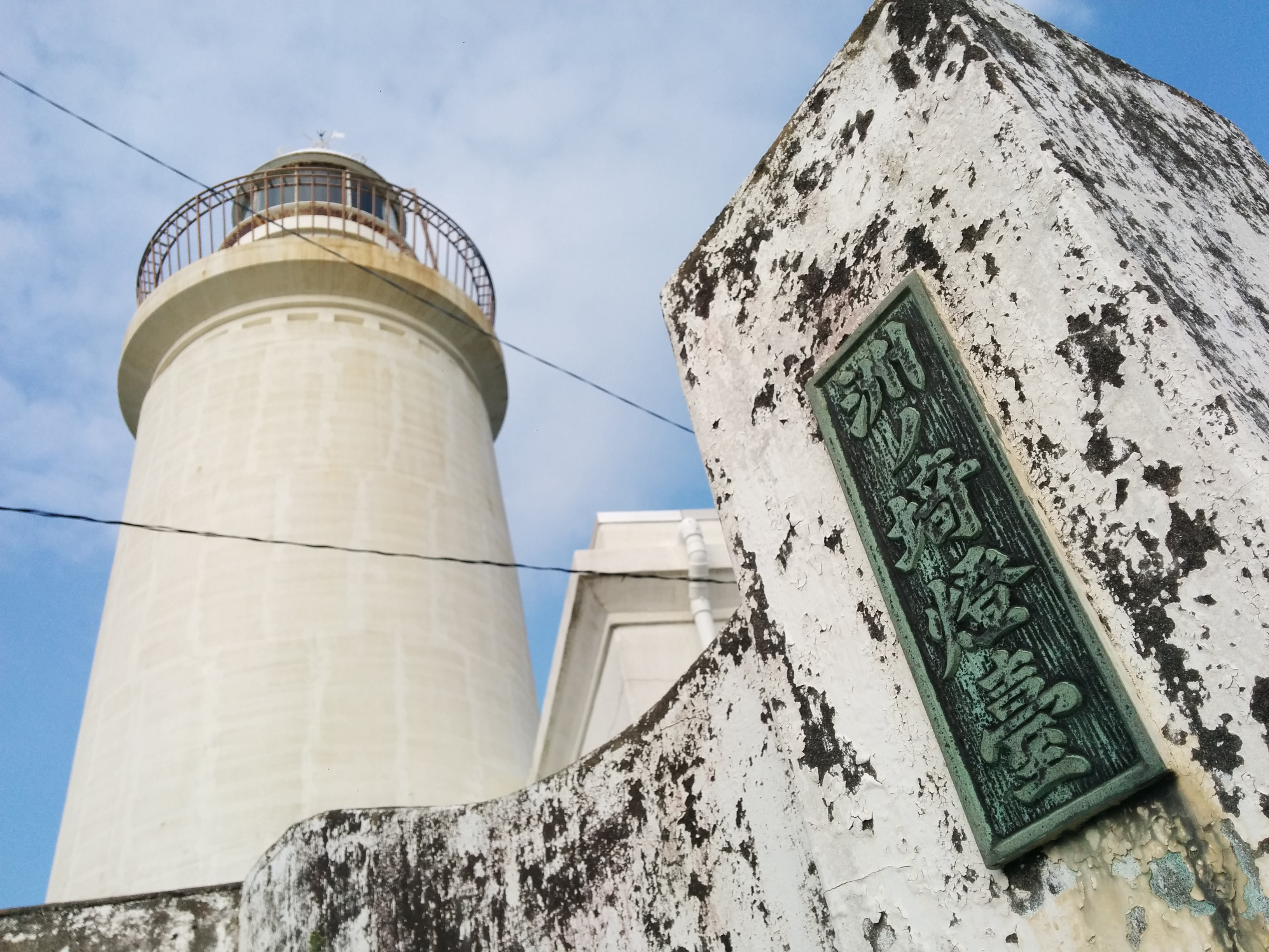 Sunosaki lighthouse